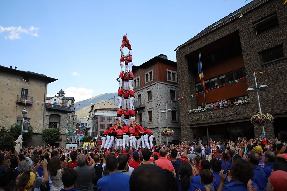 Primer 3 de 9 amb folre descarregat mai a Andorra, per la Joves de Valls, Andorra La Vella, 3-X-2019. Foto de; Roser Giner Rius.